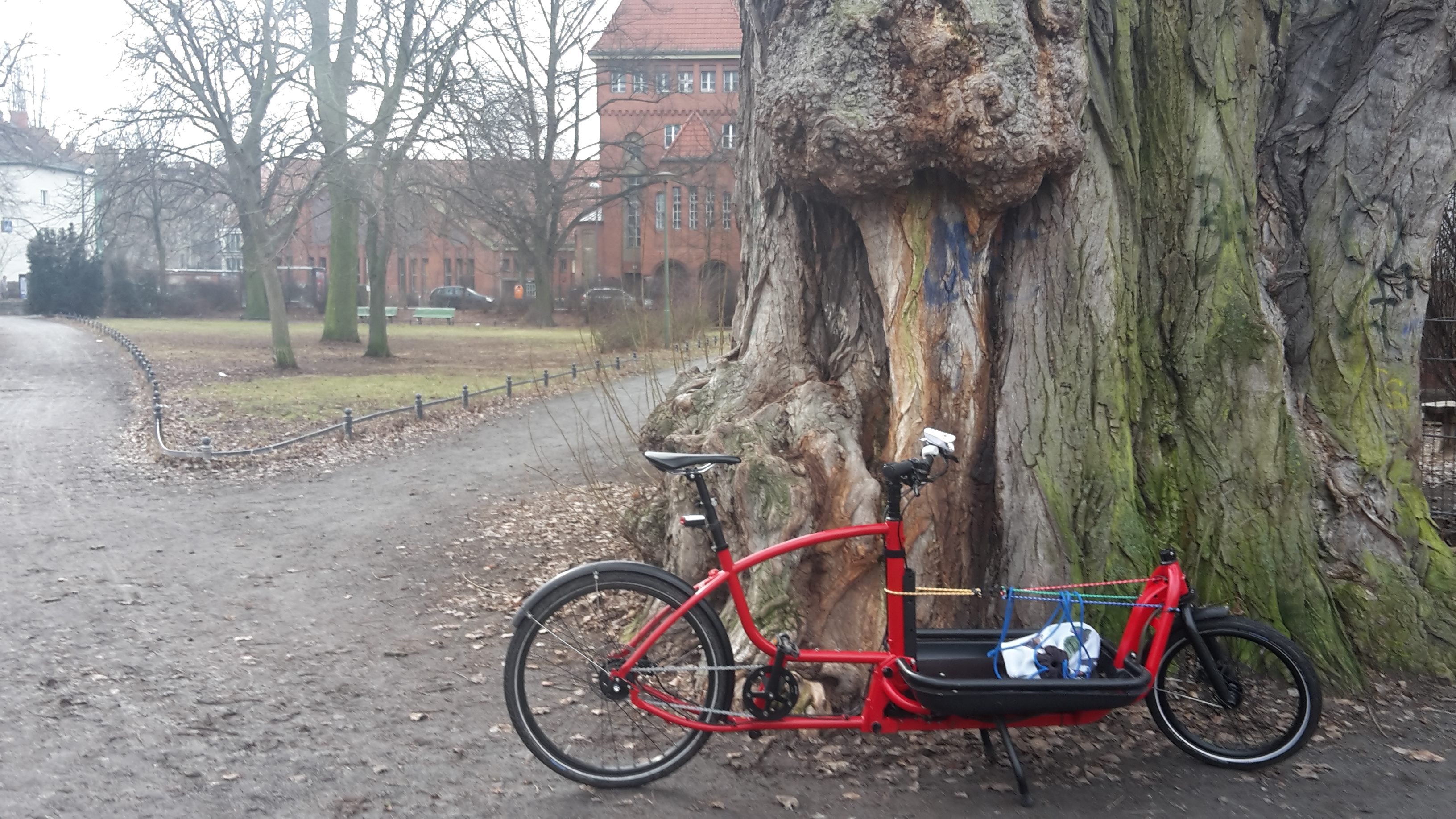 Rotes Douze Messenger mit mittlerer Ladegröße